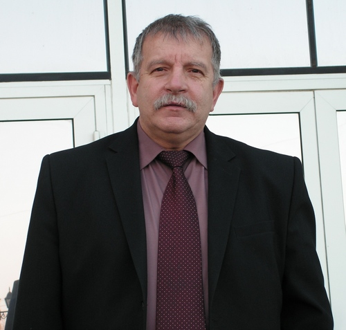 Епископ (старший пресвитер по Приморскому краю) евангельских-христиан-баптистов Владимир Григорьевич Трохименко